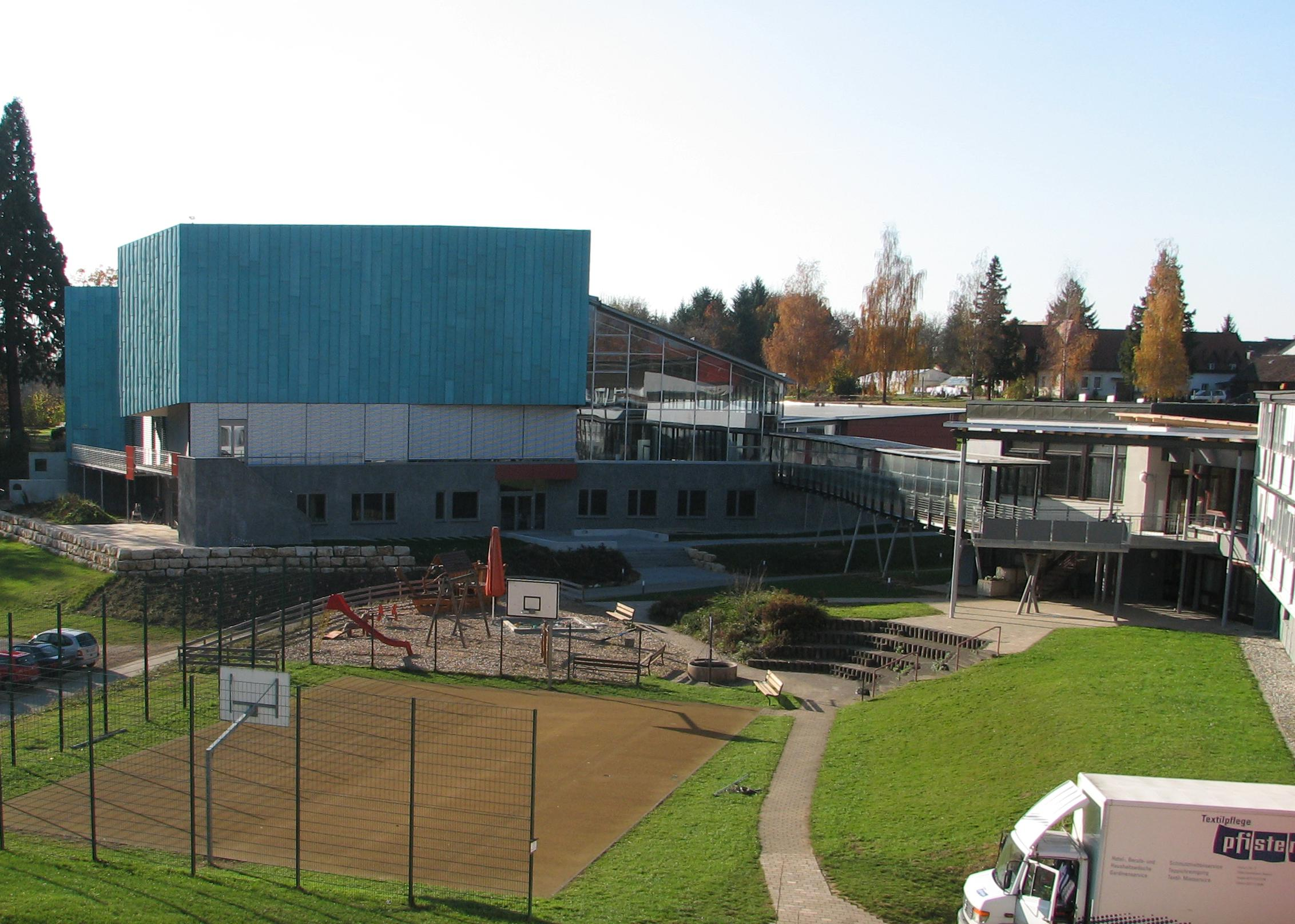 Das Bild zeigt einen Teil des Forums Schönblick